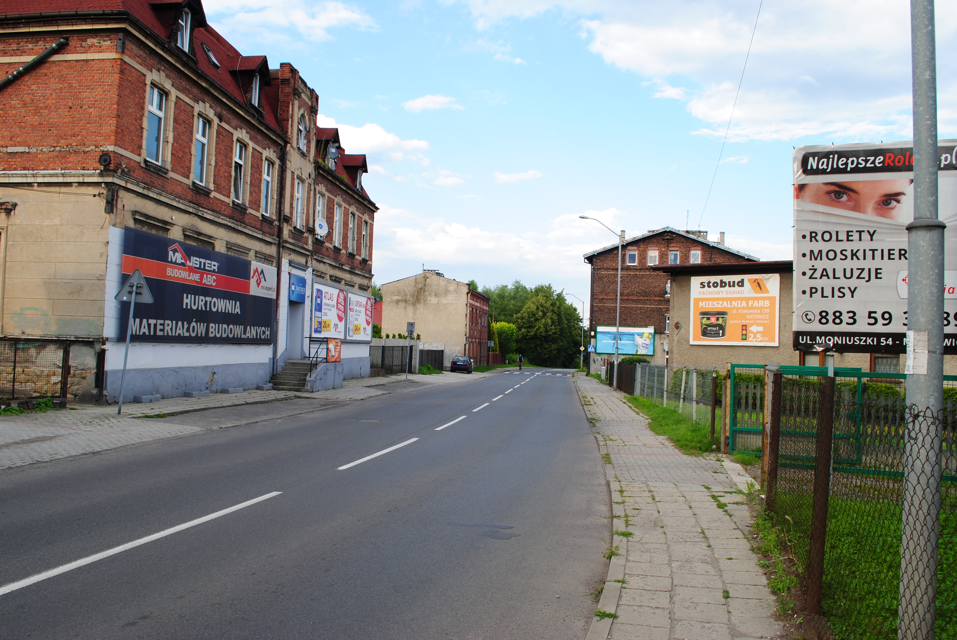 Katowice - Janów-Nikiszowiec Ul. Oswobodzenia